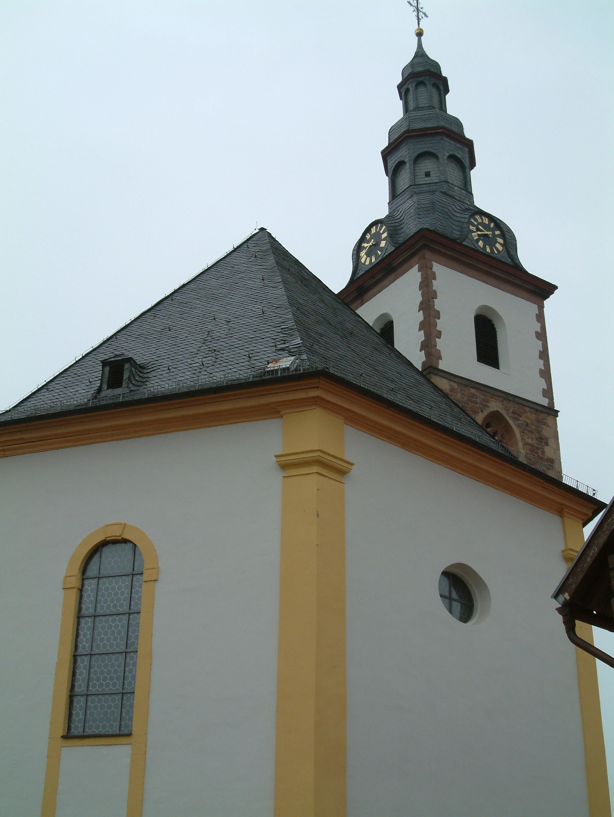 Laurentiuskirche (von Südost) zu Dirmstein, selbst fotografiert am 27.04.2006 und freigegeben durch Benutzer:Mundartpoet Bildbearbeitungen Von diesem Bild existieren die folgenden Bildbearbeitungen aus der Bilderwerkstatt: Image:2006 Dirmstein-Laurentiuskirche-Südost-2.jpg